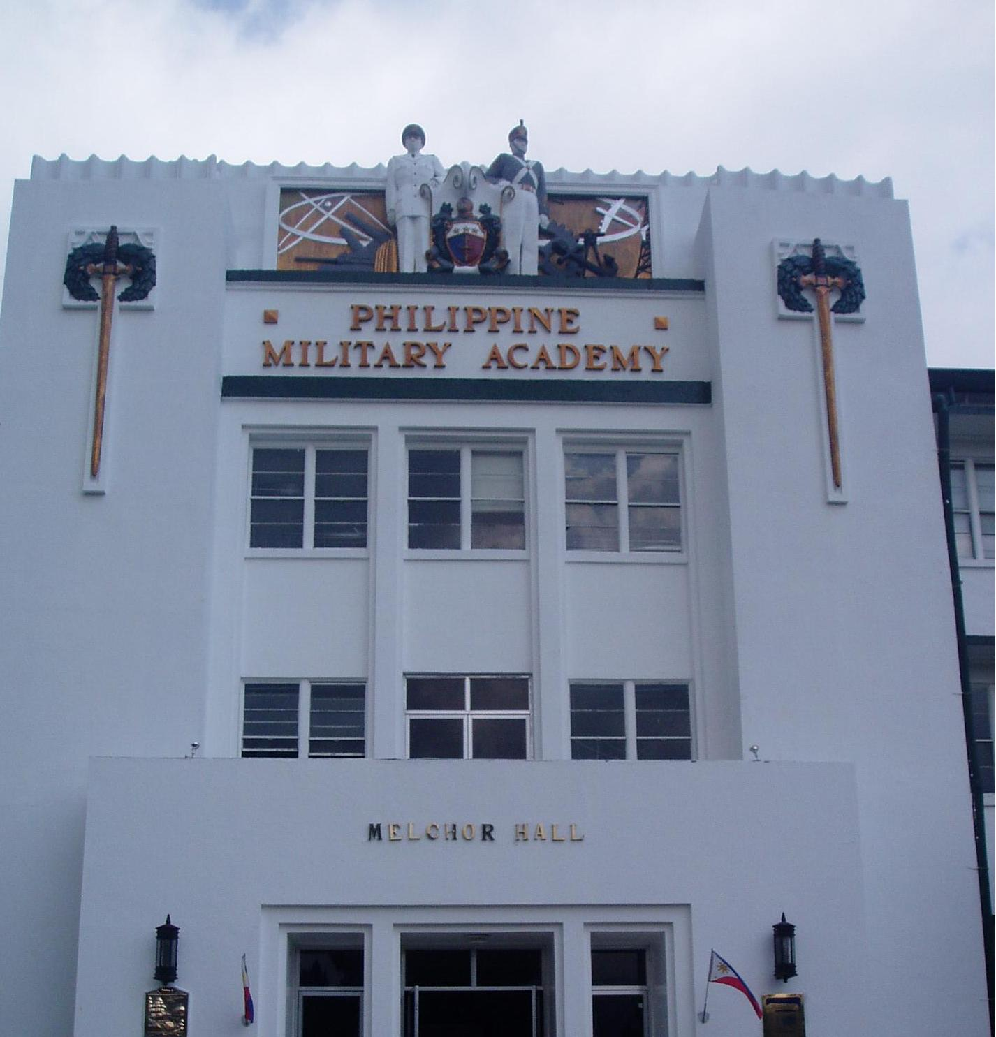 Tagalog: Melchor Hall, Philippine Military Academy, aking gawa